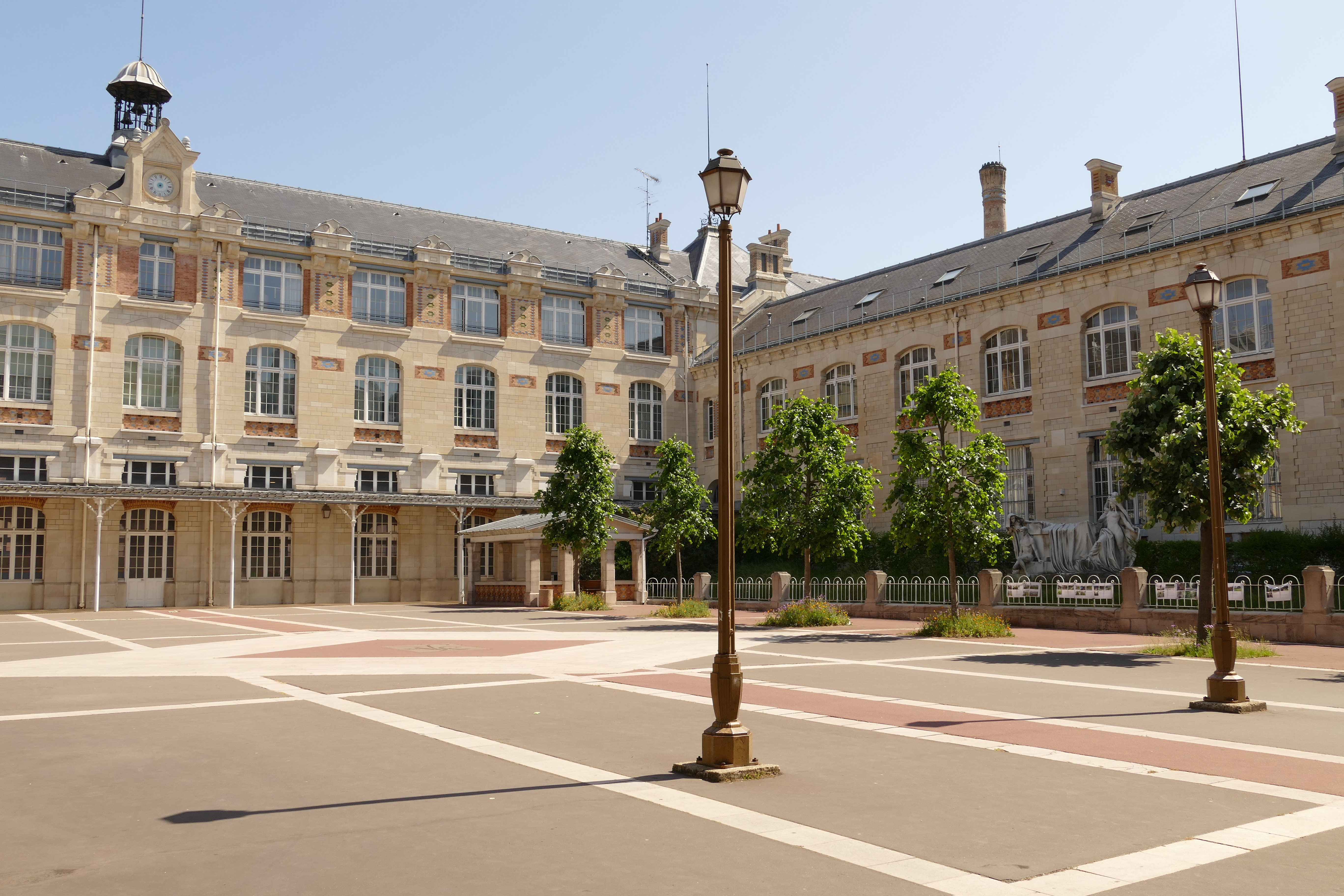 Lycée Voltaire à Paris (11e arrond.), la cour d'honneur, architecte Eugène Train (1832-1903).